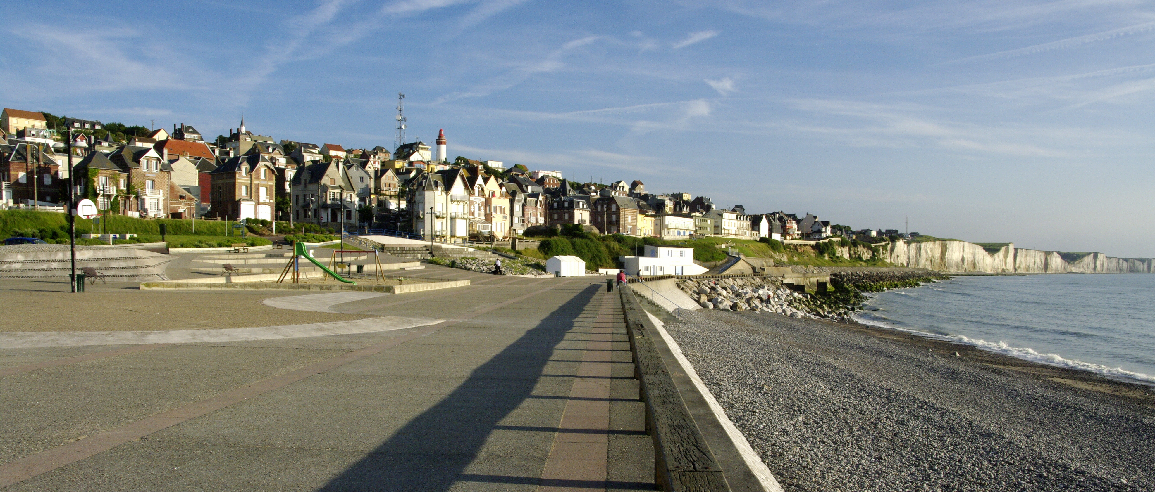 La ville d'Ault vue de la plage.